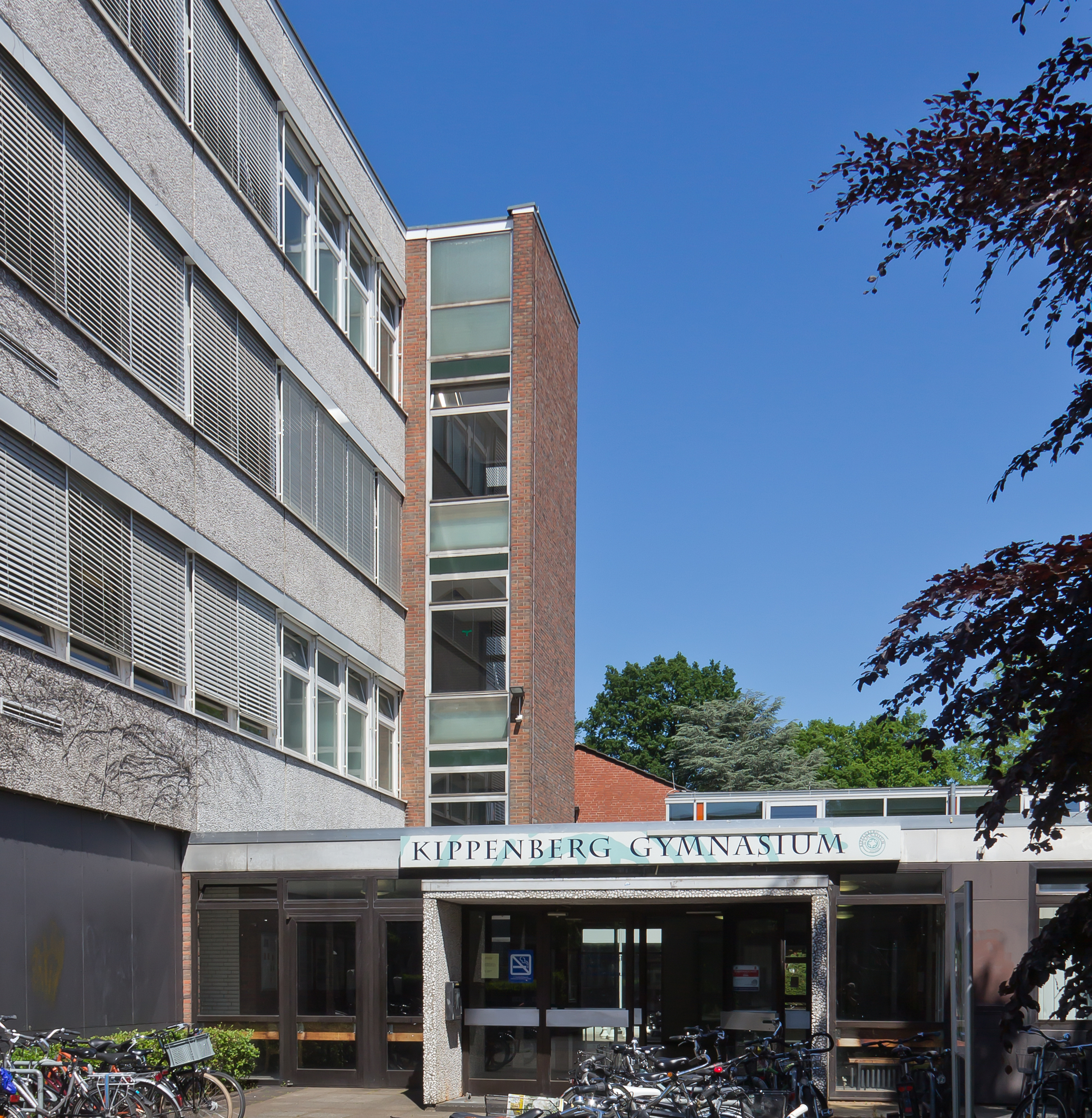 Kippenberg-Gymnasium Bremen, Eingangsbereich Neubau